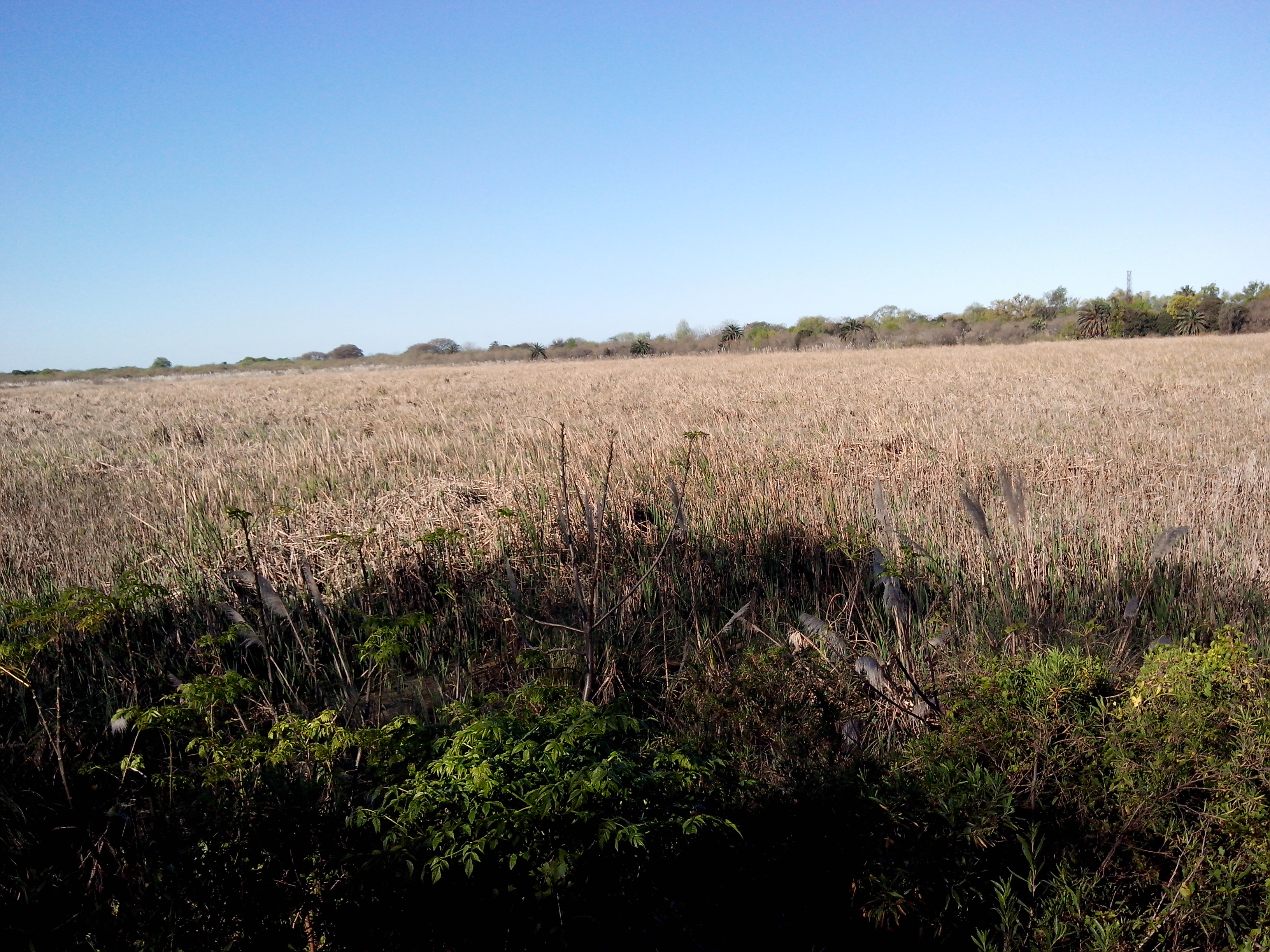 Foto tomada en la reserva ecológica ubicada en Costanera Sur.